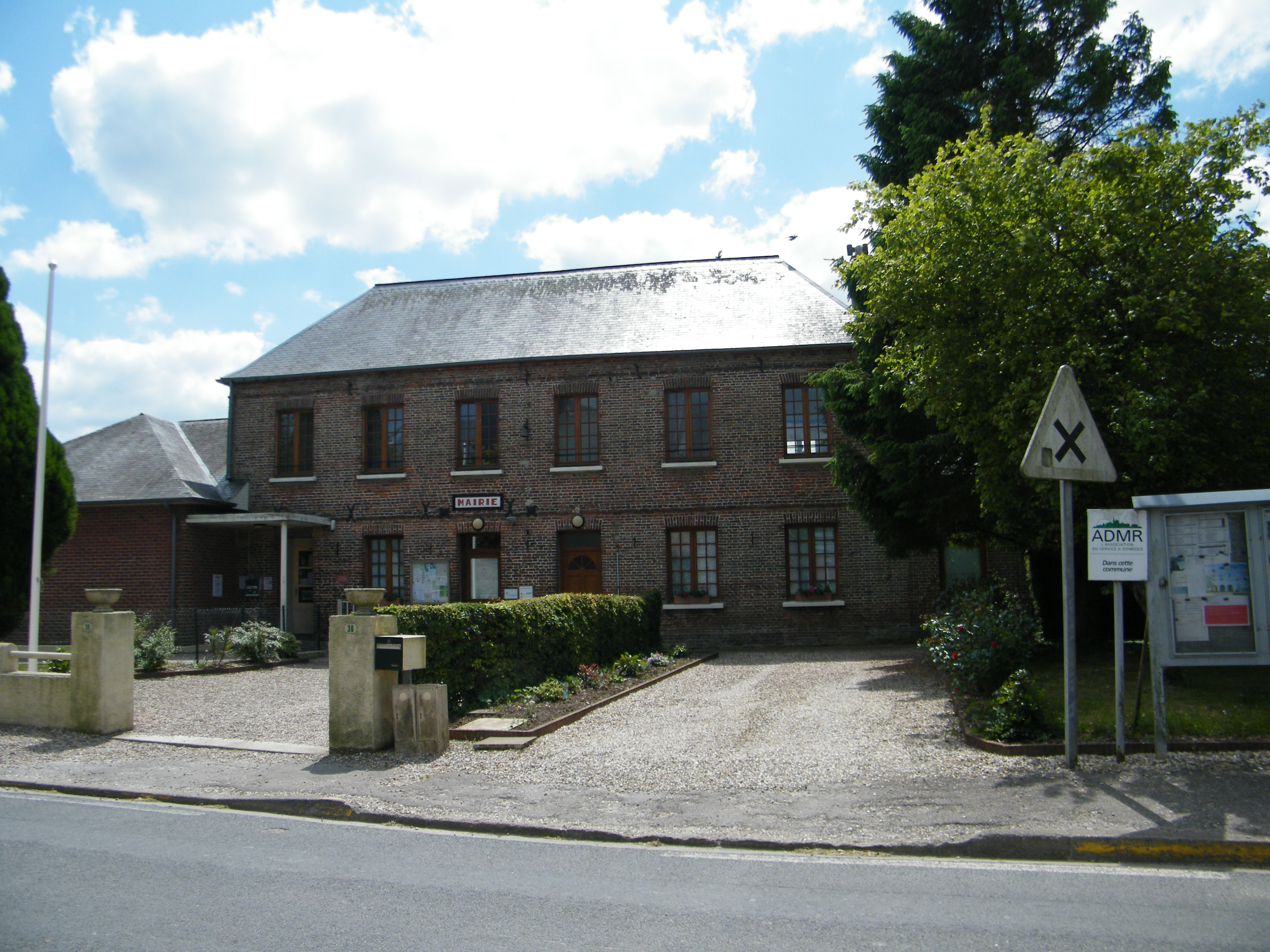 Mairie.